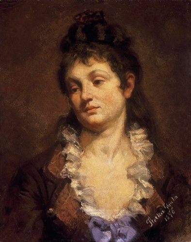 Stetka Gyula: Női portré (olaj, karton, 1870)